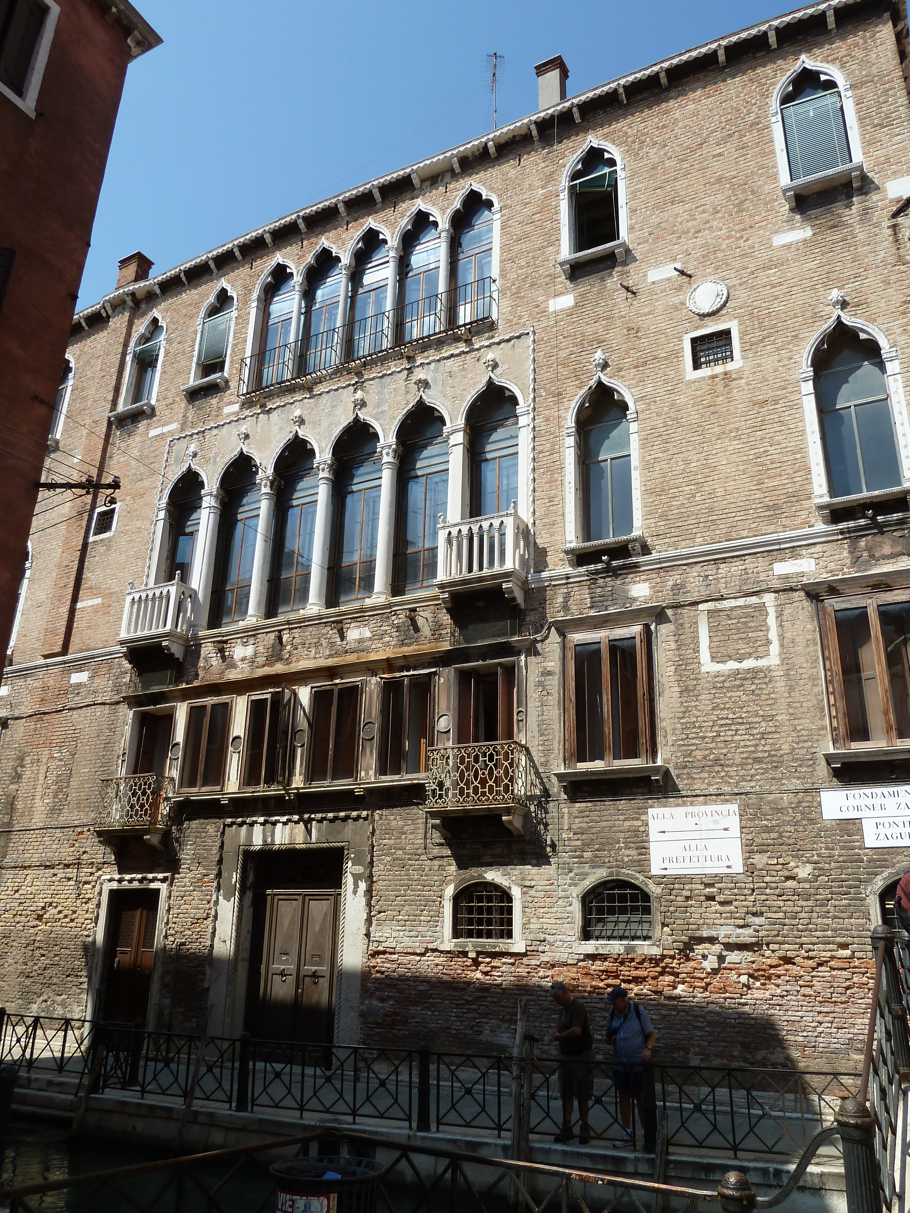 Pal zaguri